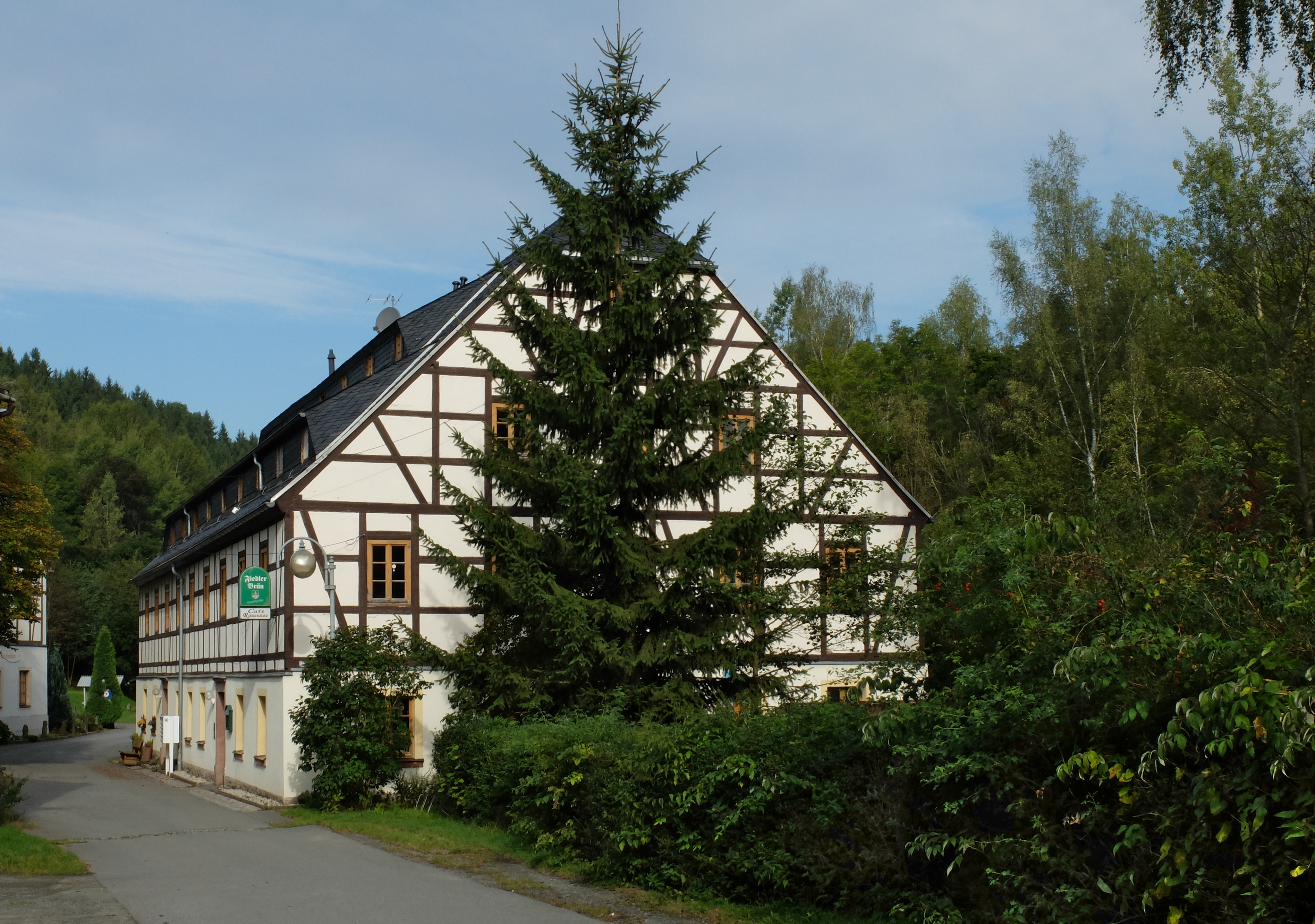 Baudenkmal Himmelmühle - gleichnamiger Ortsteil in Thermalbad Wiesenbad (Adresse: Himmelmühle 14, 09488 Thermalbad Wiesenbad)